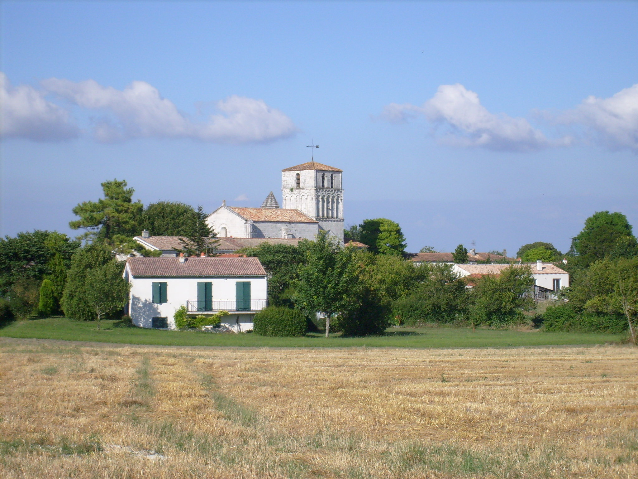 L'église de Saint-Sulpice